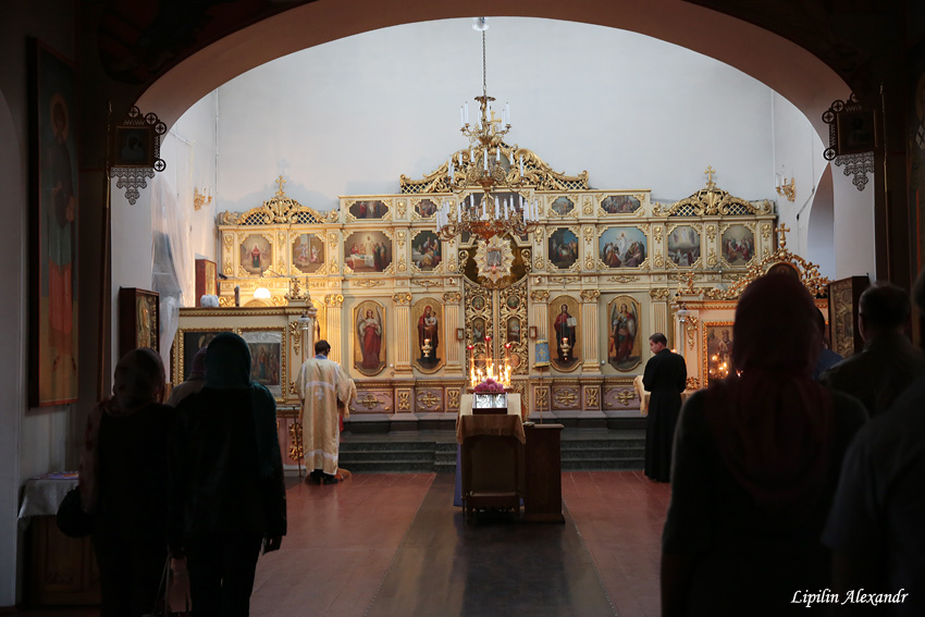 Гомельскі Мікольскі манастыр. Іканастас